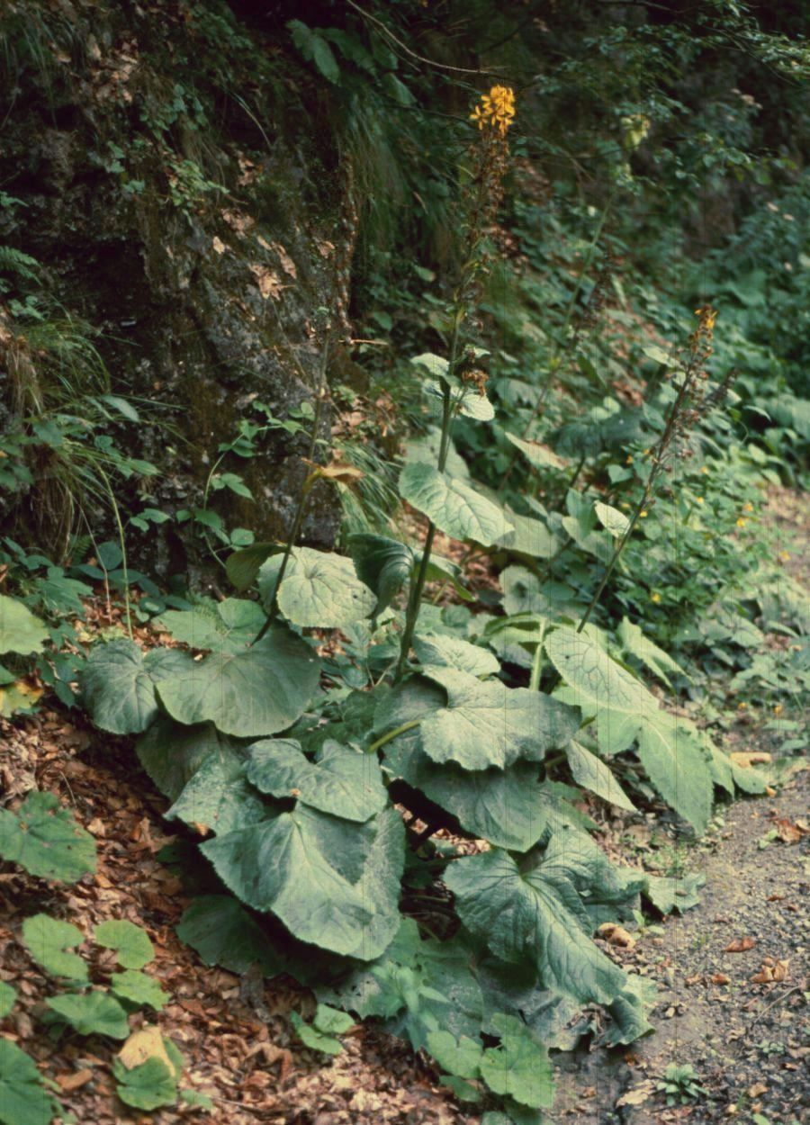 Sibirischer Goldkolben (Ligularia sibirica), Korbblütler (Asteraceae) - Rumänien/România: Südkarpaten, NW Băile Olăneşti